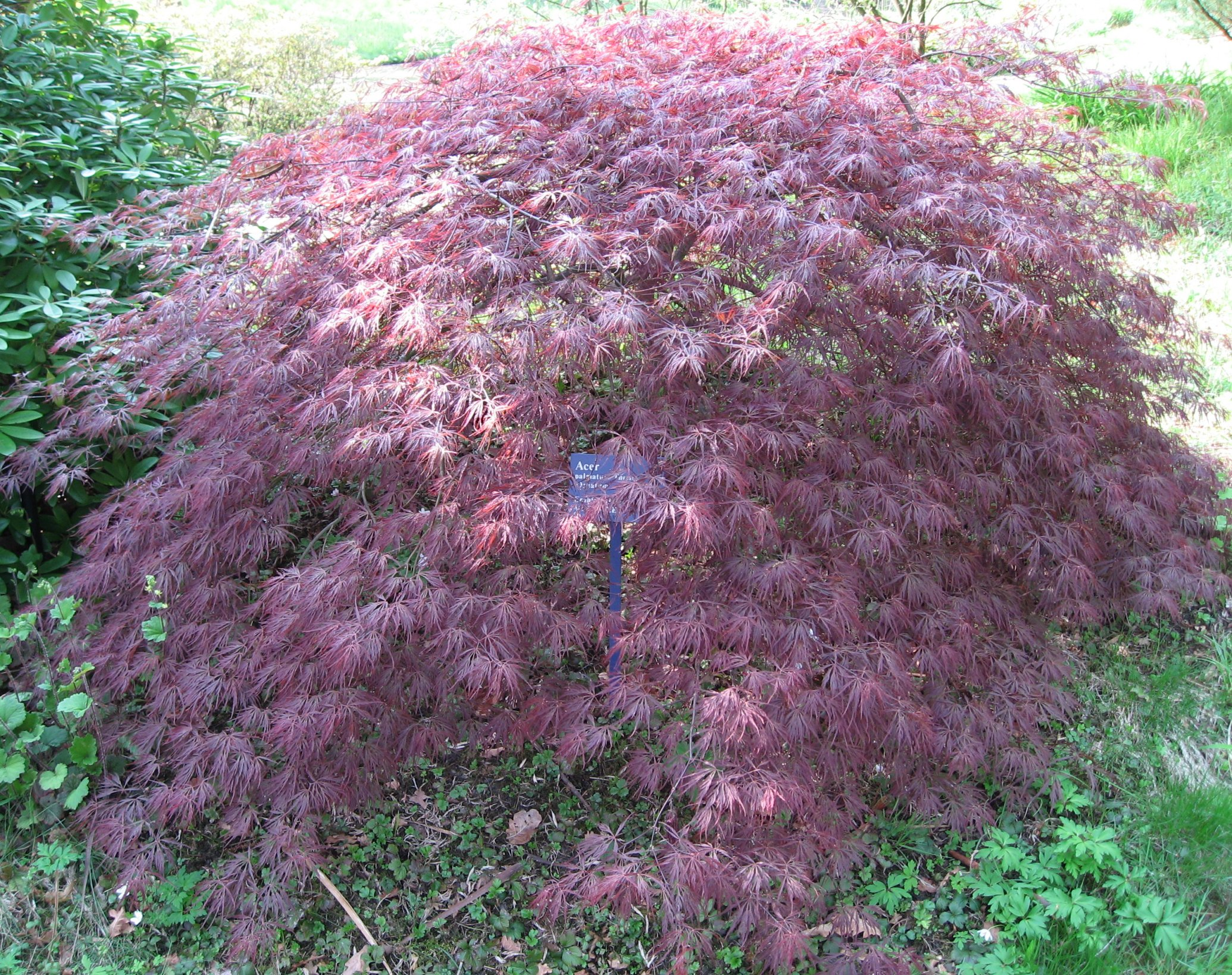 Acer palmatum 'Ornatum' (Erable palmé (cultivar)) in Arboretum de la Vallée-aux-Loups Map: 48° 46' 22" N 2° 16' 5" E